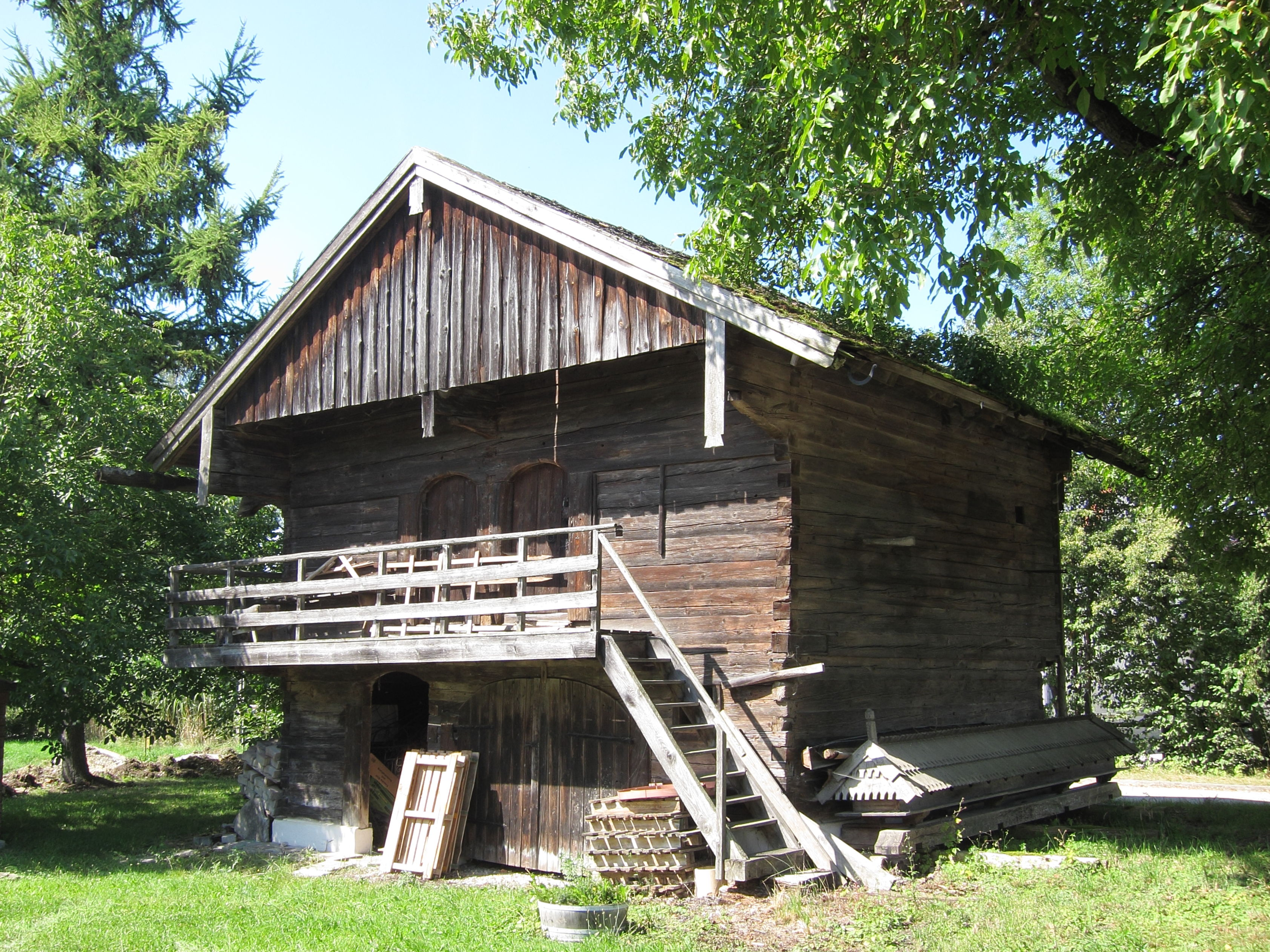 Hammersdorf 1a; Ehem. Getreidekasten, zweigeschossiger Satteldachbau in Blockbauweise mit Laubengang (bestes Beispiel im Landkreis Erding), Mitte 16. Jh.